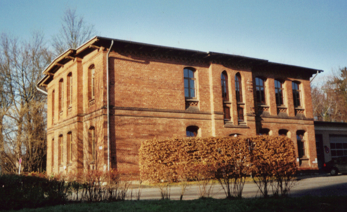 Nebengebäude (um 1890) des ehem. städt. Krankenhauses in Hildesheim